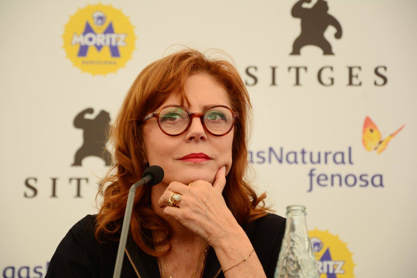 Susan Sarandon - Gran Premi Honorífic